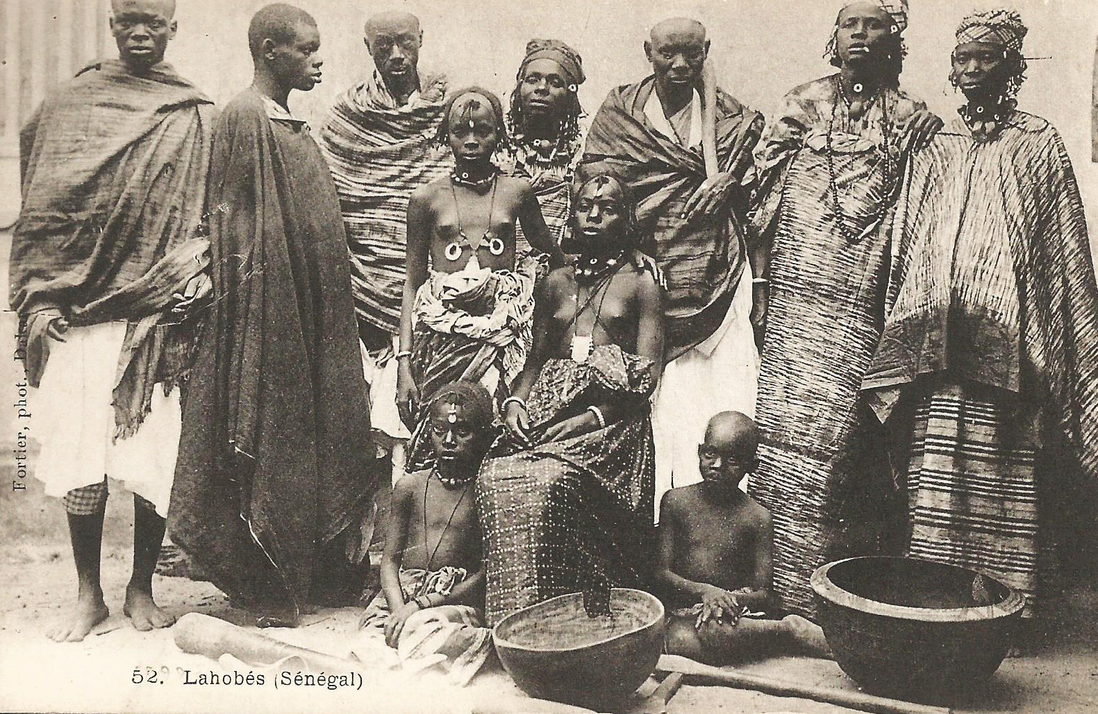 François-Edmond Fortier, Sénégal. Lahobés. Afrique Occidentale - Sénégal.